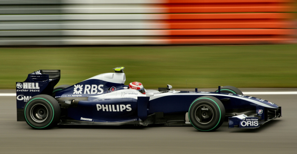 Nakajima at the nurburgring